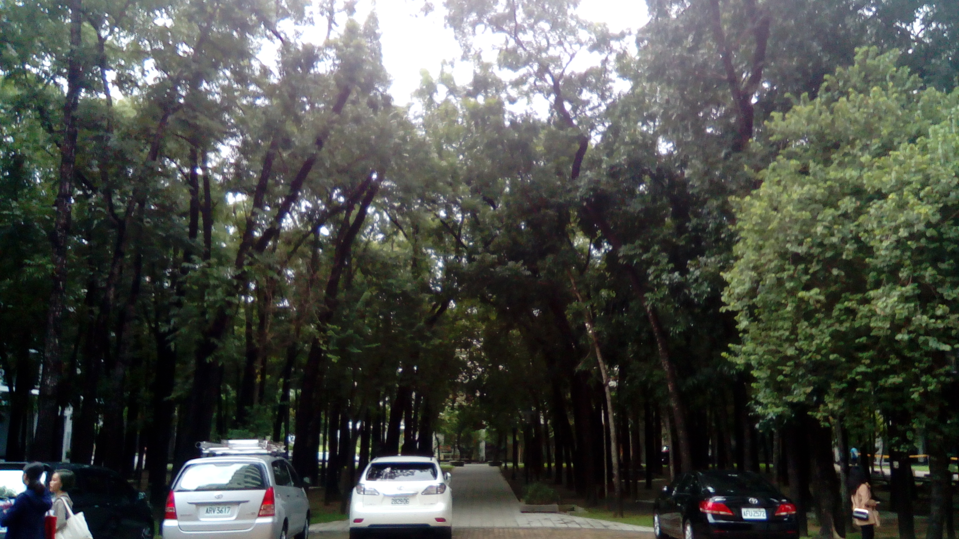 位於進修部(Y棟)前的林蔭 學生可在此避雨及避暑